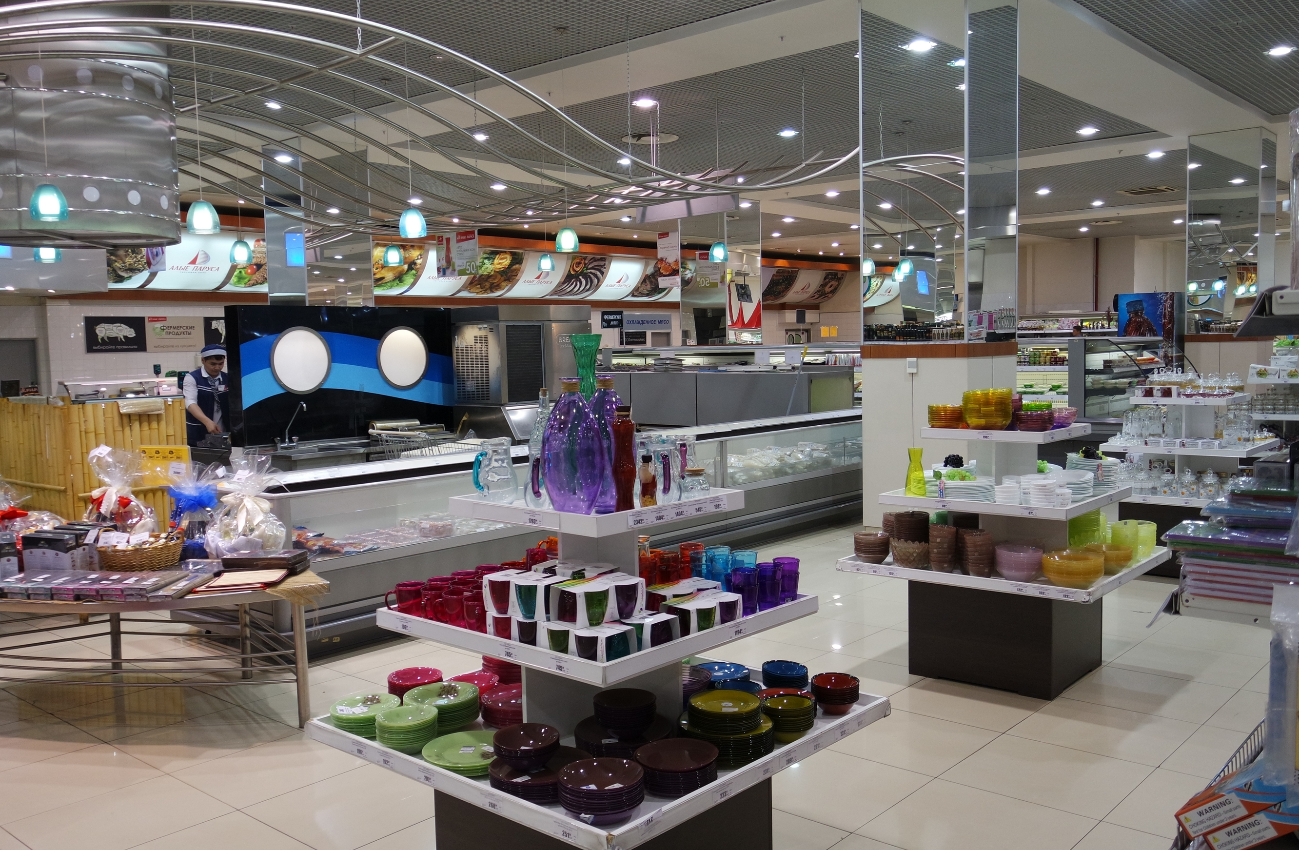 Стилобат жилых высоток-близнецов (Авиационная, 66, около метро Щукинская). В стилобате расположен универсам и офис торговой сети «Алые паруса»